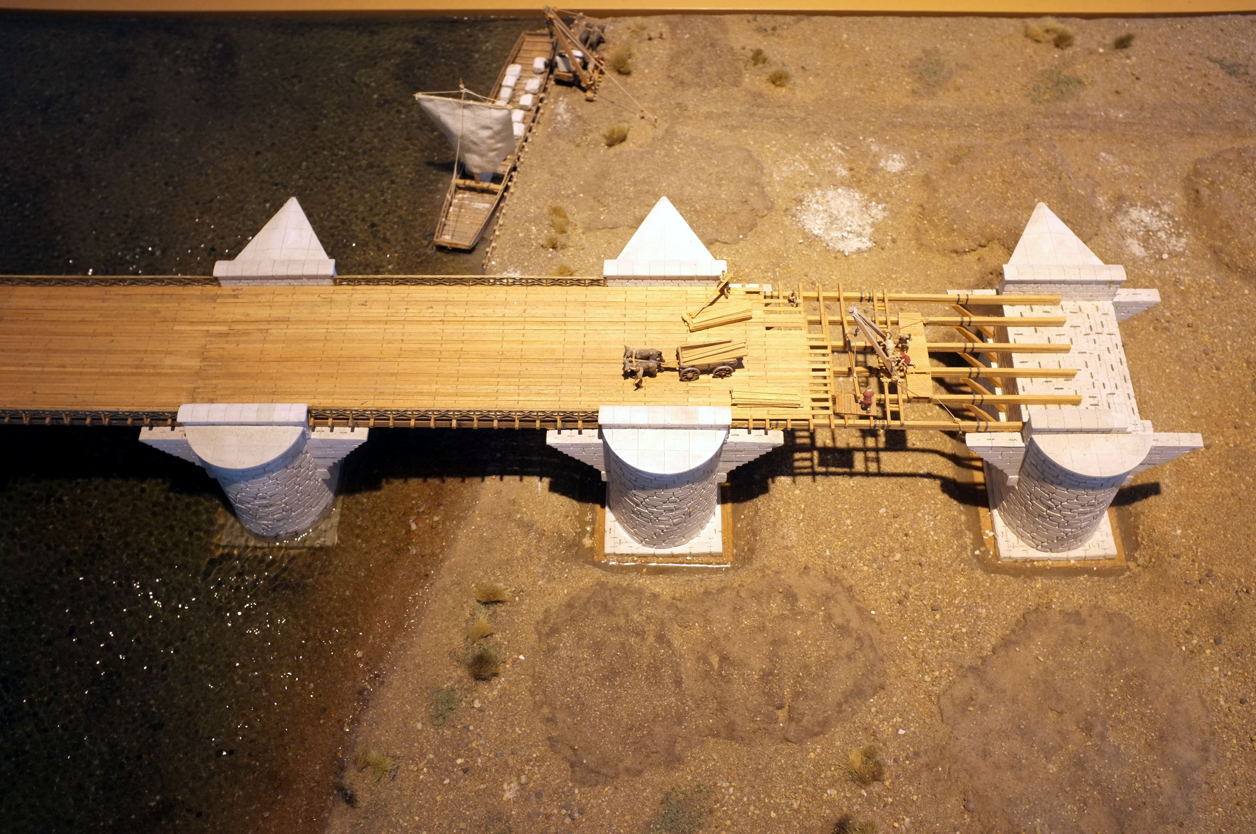 Modell der großen Donaubrücke bei Steppberg